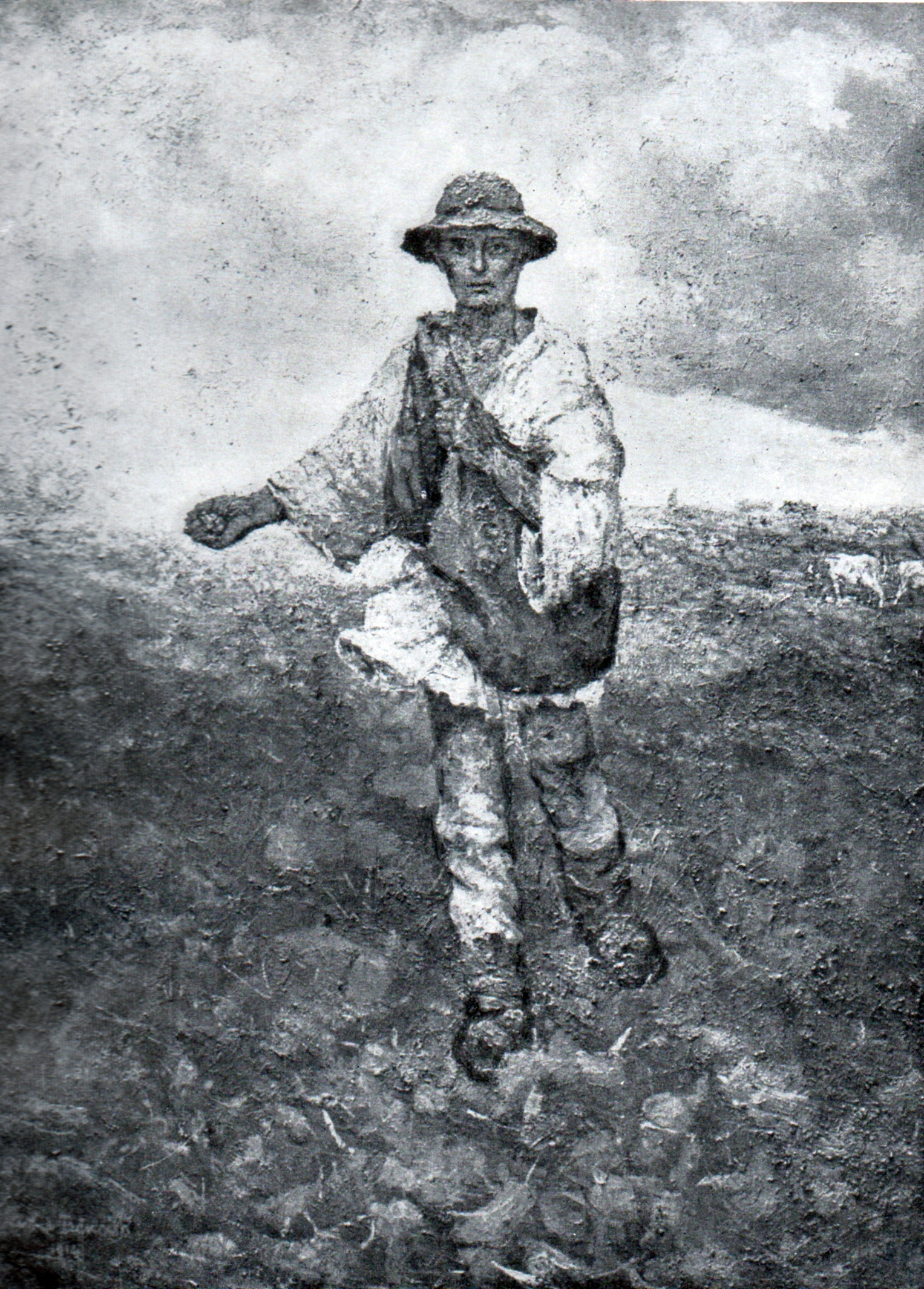 Semănătorul